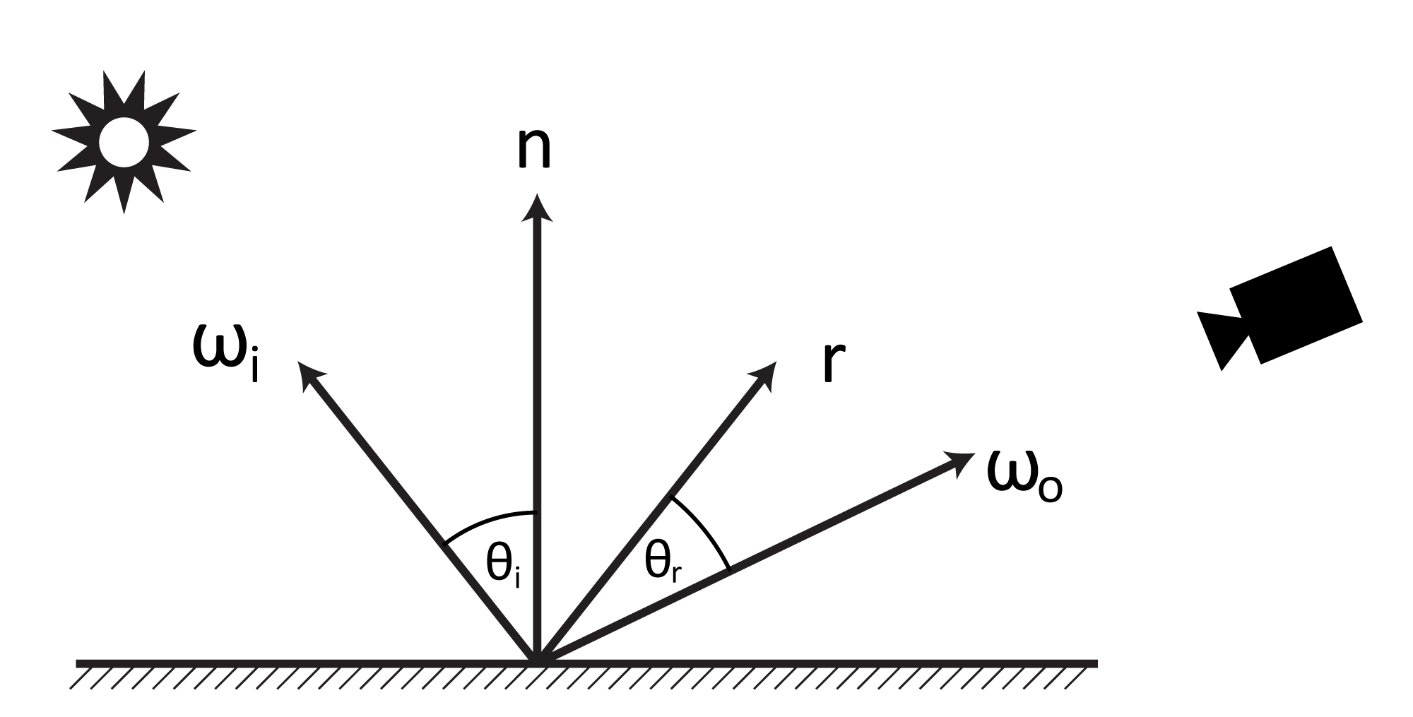 Phong v radiometrickém názvosloví